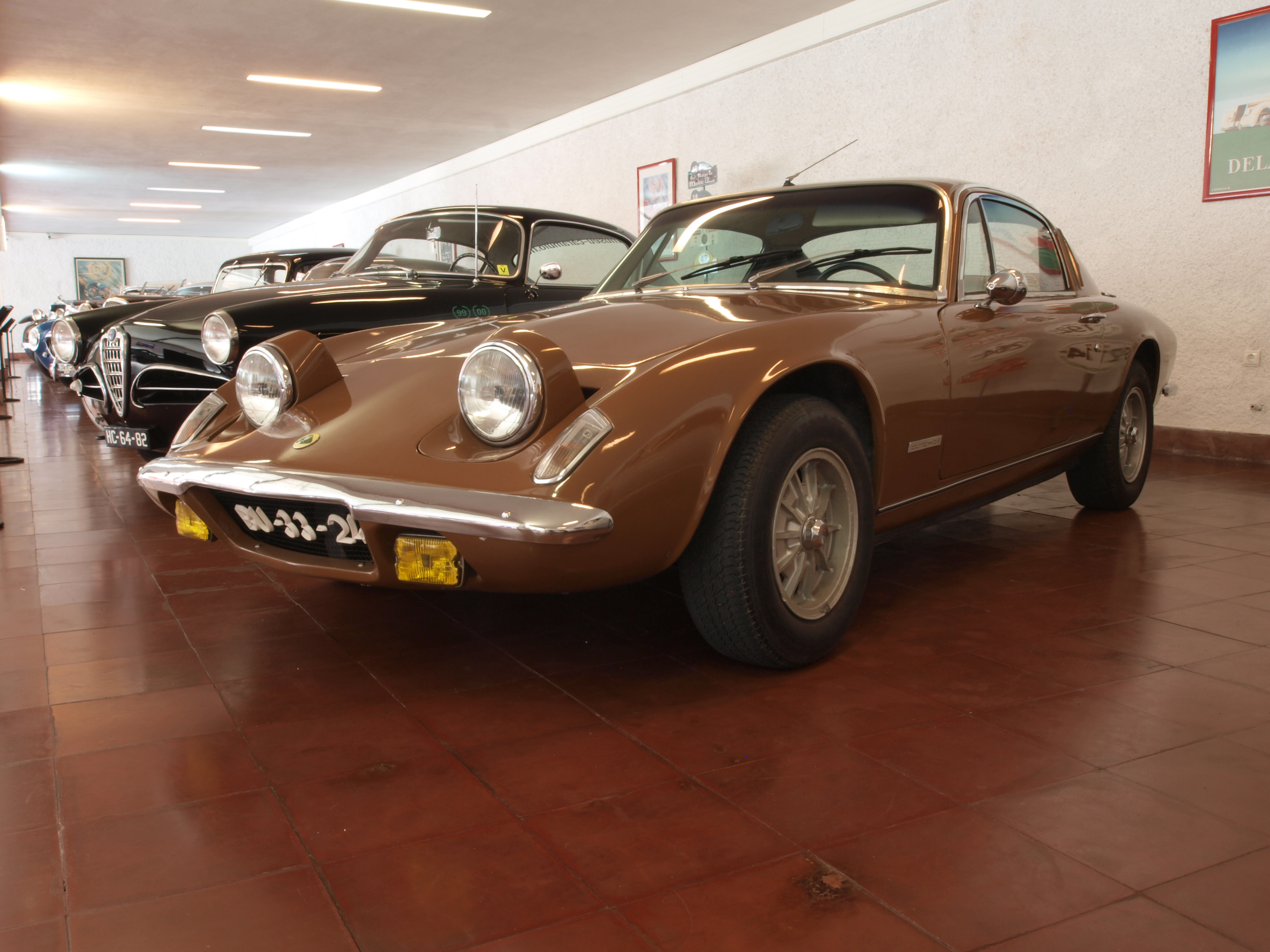 Photographed at the Caramulo museum, 'Museu do Caramulo', Caramulo, Portugal. OLYMPUS DIGITAL CAMERA